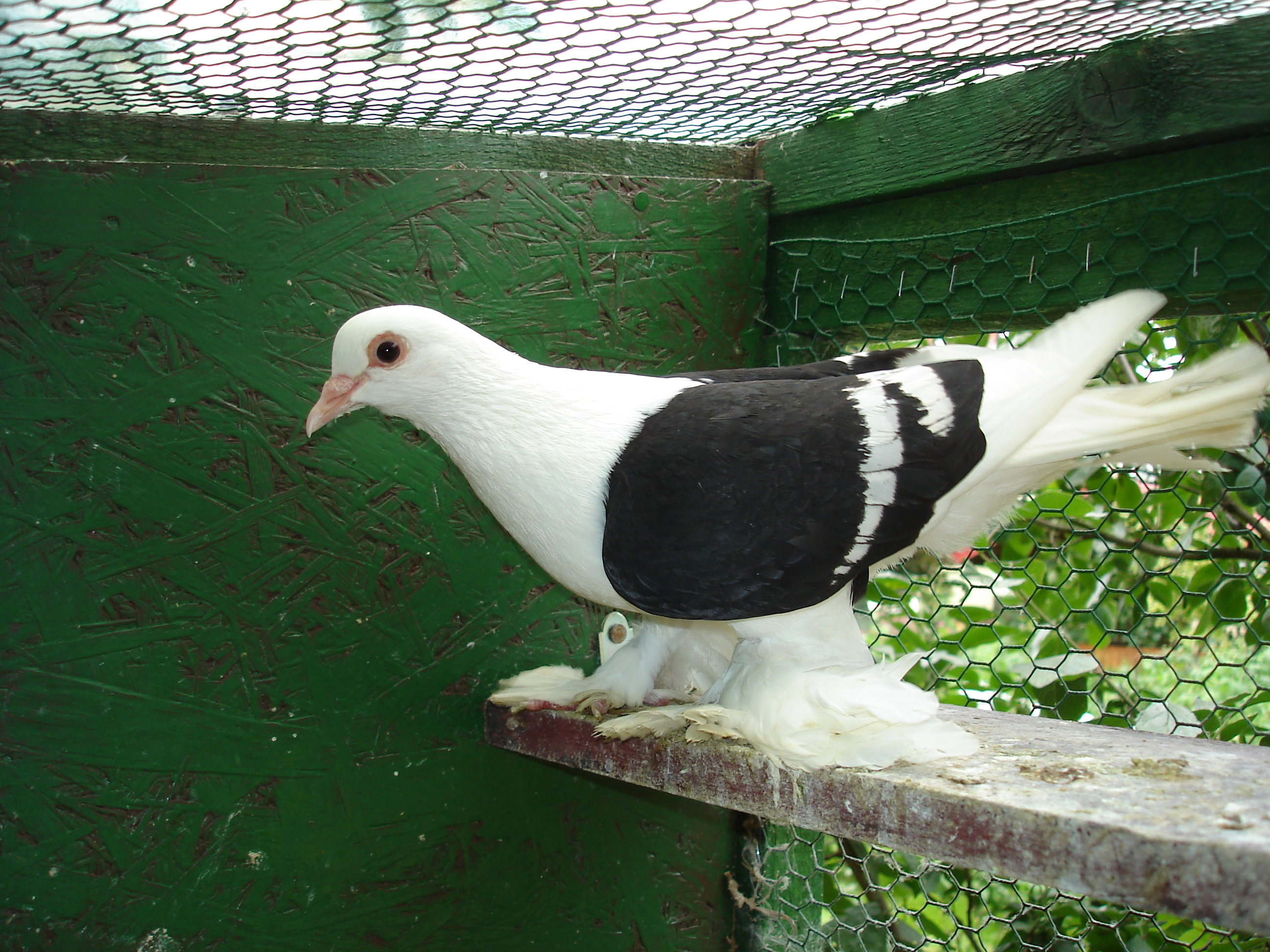 Zdjęcie saksońskiego tarczowego